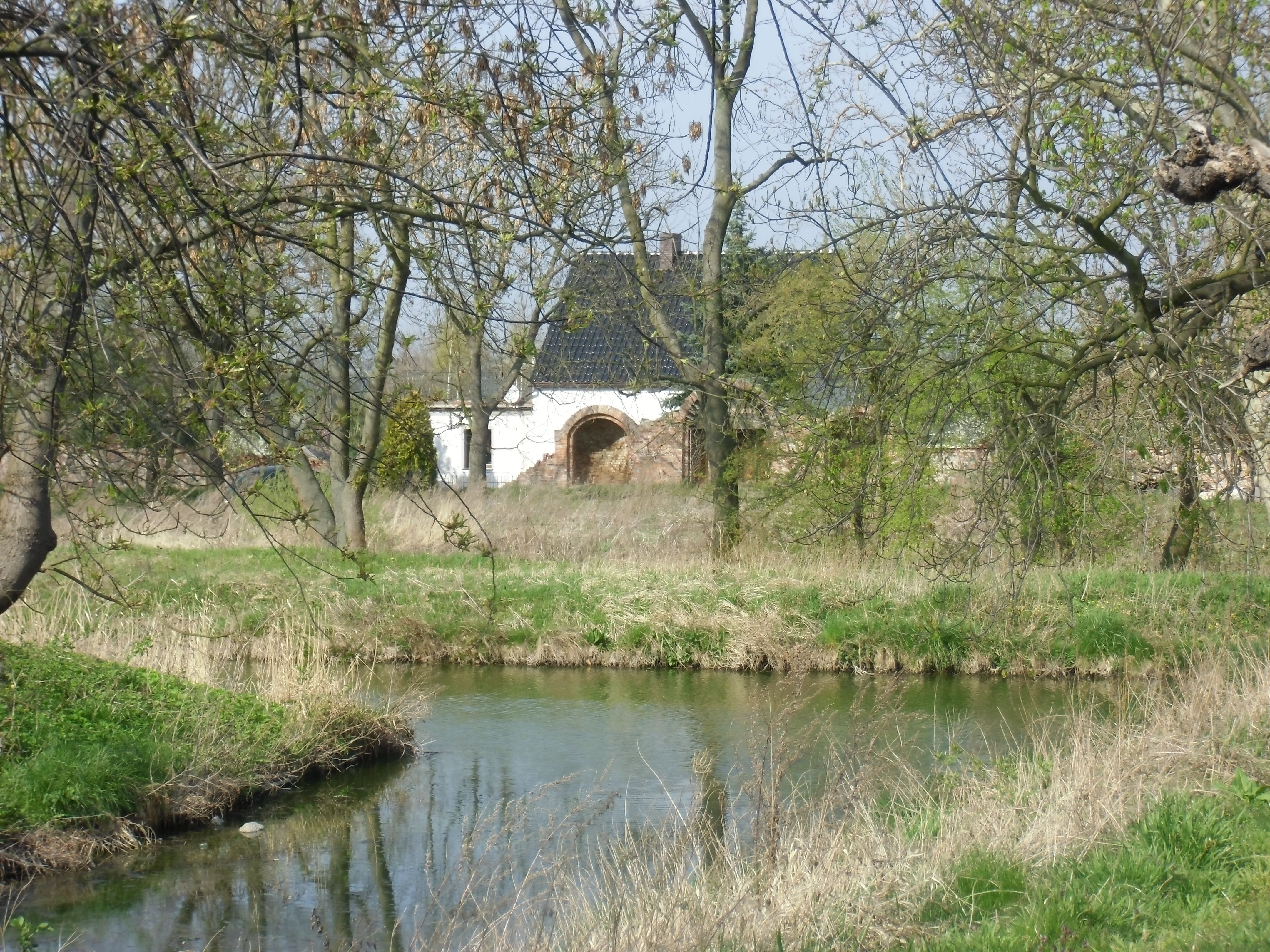 Dłużyce, park